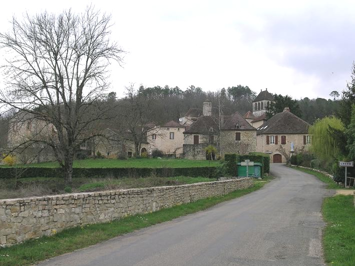 Village de Lherm, dans le département du Lot (France, Midi-Pyrénées)